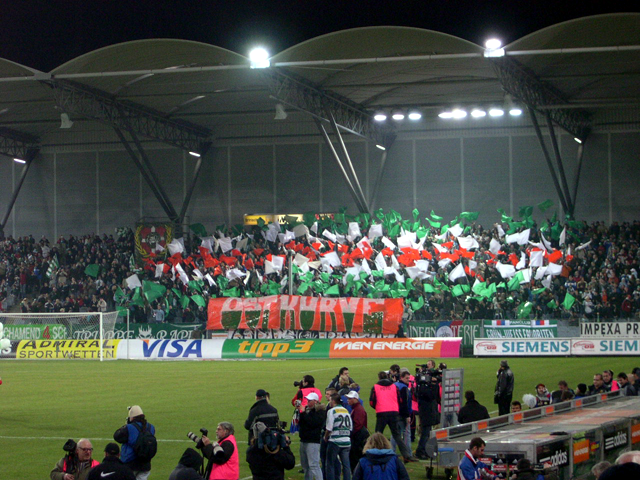 Rapid-Fans auf der Ost-Tribüne des Hanappi Stadions